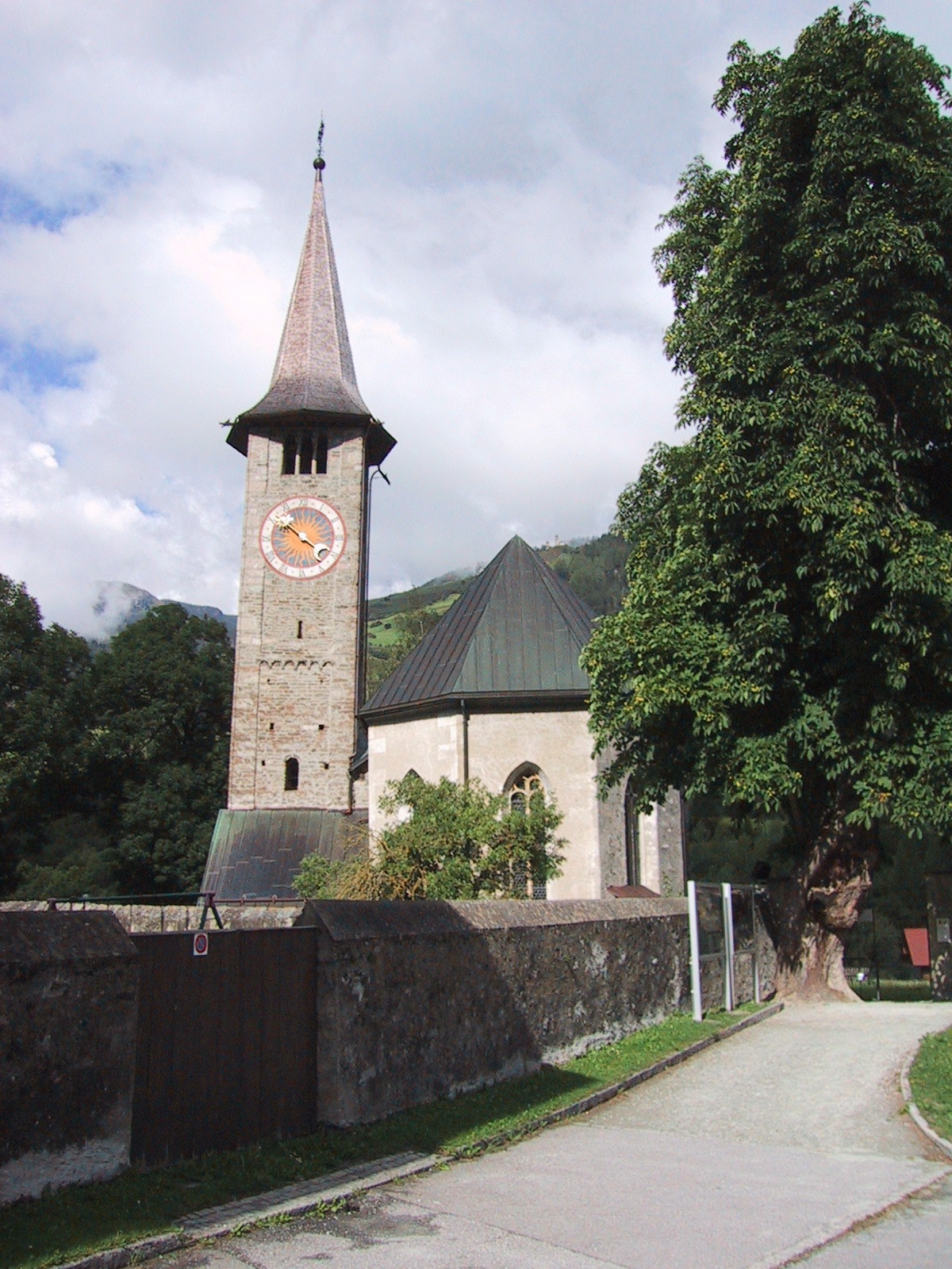 Kirche St. Martin in Zillis, Kanton Graubünden.